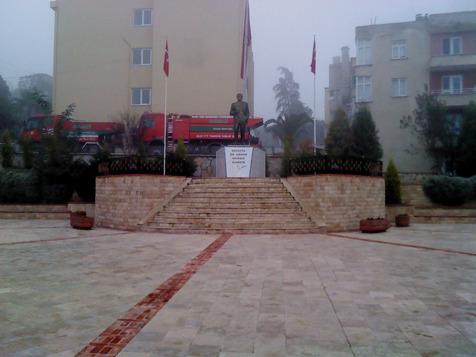 yatağan meydanı [ r. nazilli ]